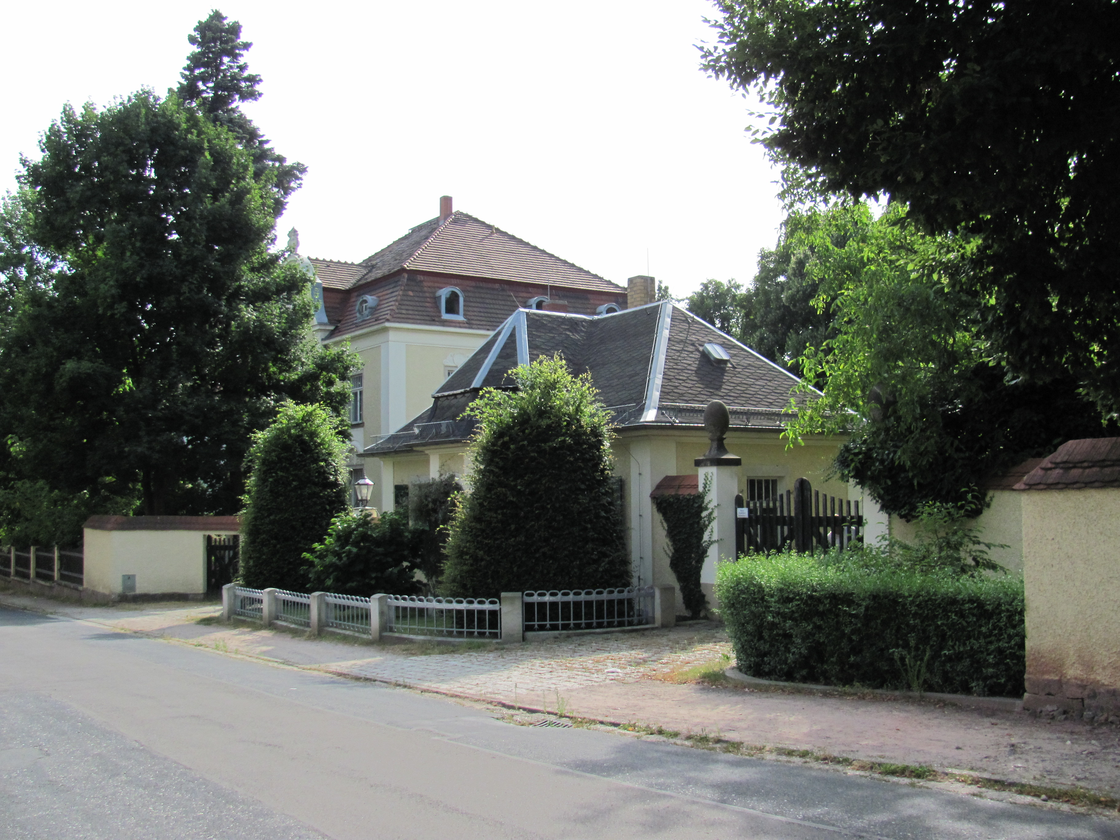 Radebeul Villa Fabrikant Sommer Kavaliershaus